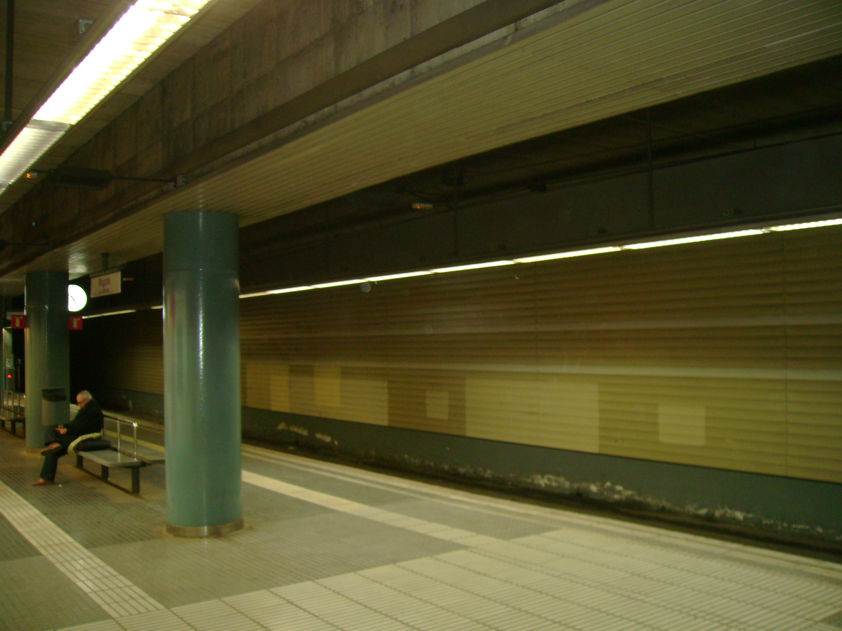 Foto capturada per la meva càmara a l'estació de Magòria - La Campana (Metro de Barcelona).